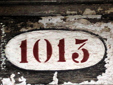 Numero civico veneziano